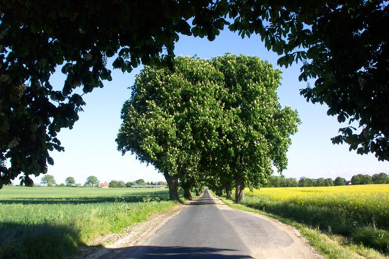 landschaftsprägende Kastanienallee im westlichen Mecklenburg bei Ganzow